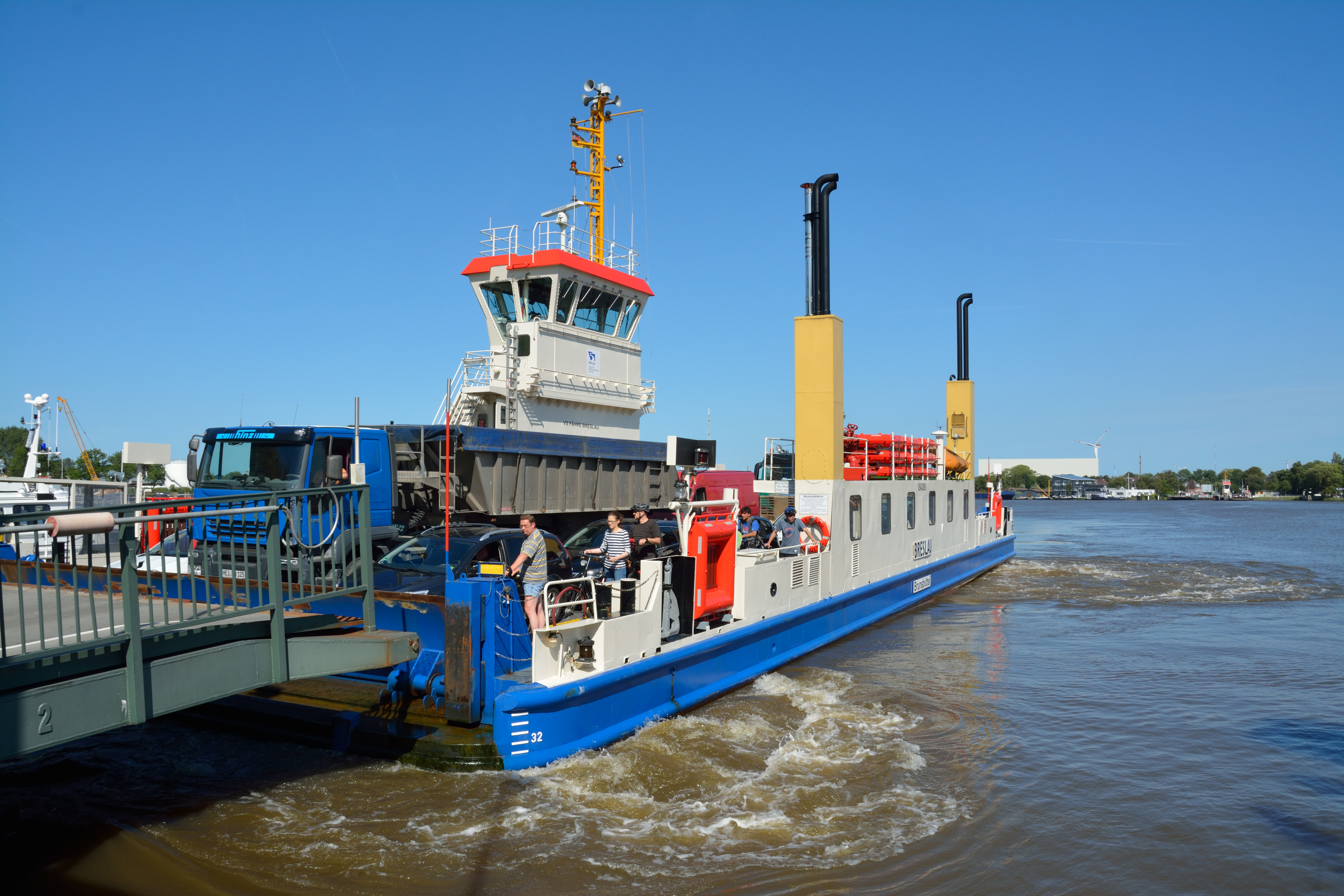 Fähre "Breslau" am Fähranleger in Brunsbüttel. Dies ist eine der wenigen Fähren mit 100 Tonnen Tragkraft, normal sind auf dem Nord-Ostsee-Kanal 45 Tonnen. Hier beim seitlichen Einparken mit dem Voith-Schneider-Antrieb.